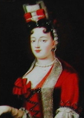 Christine Charlotte von Württemberg, Regentin von Ostfriesland, postumes Porträt